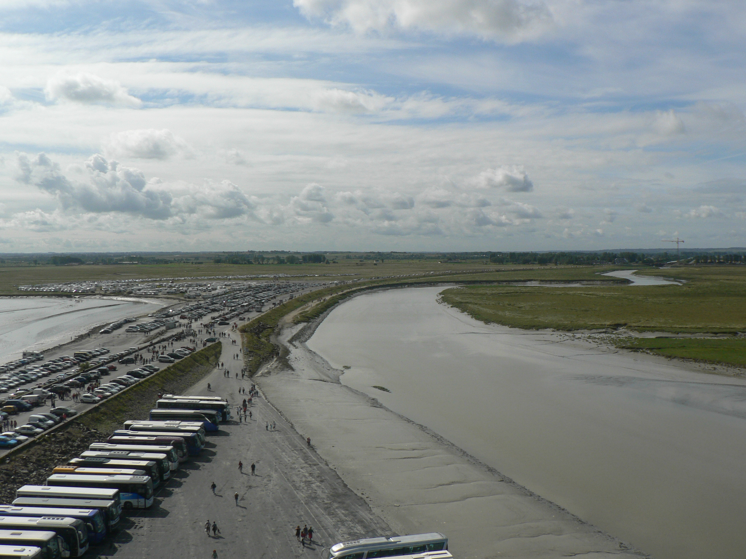 Blick vom Mont Saint Michel aus über den großen Parkplatz